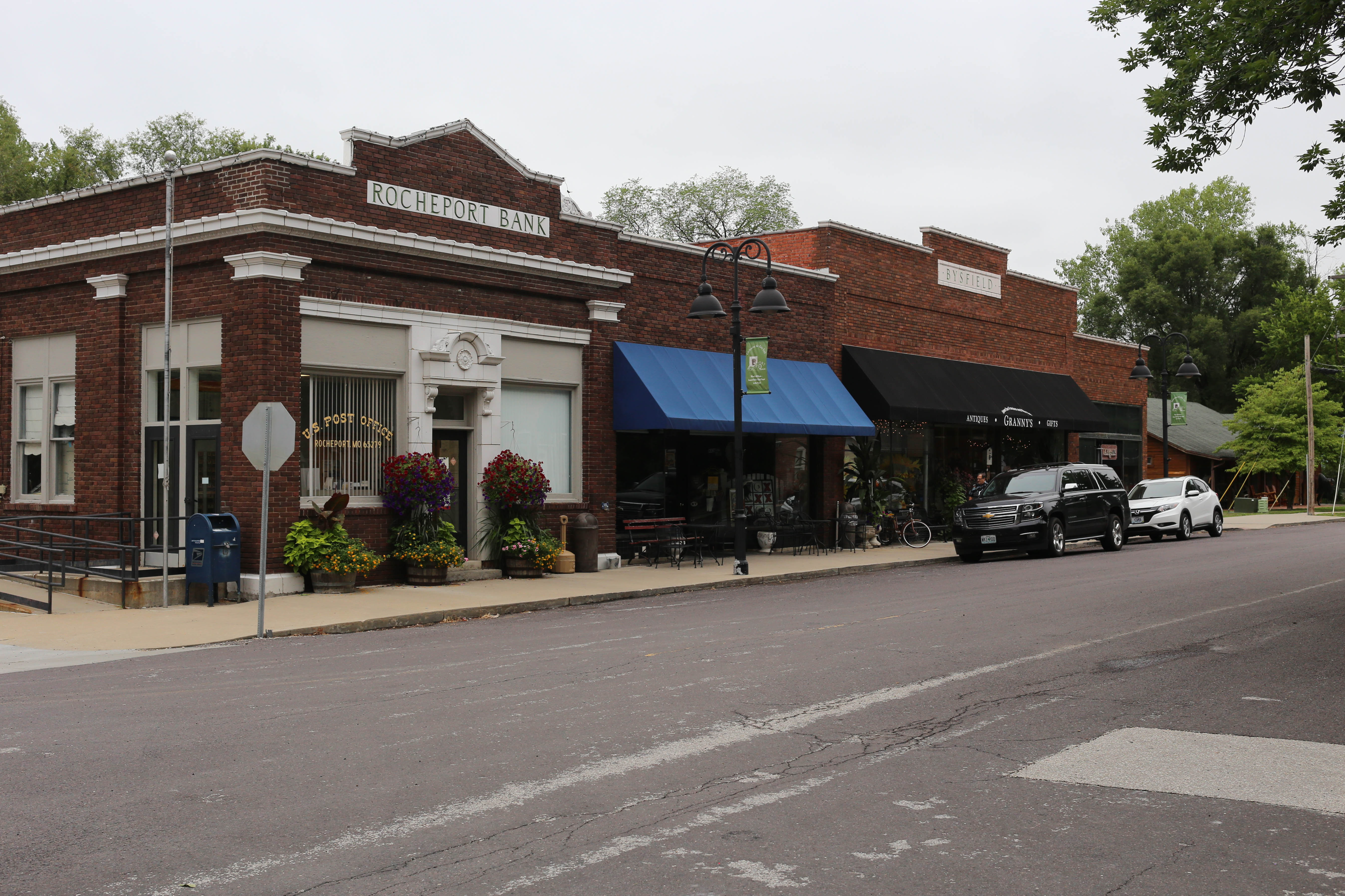 Rocheport, MO